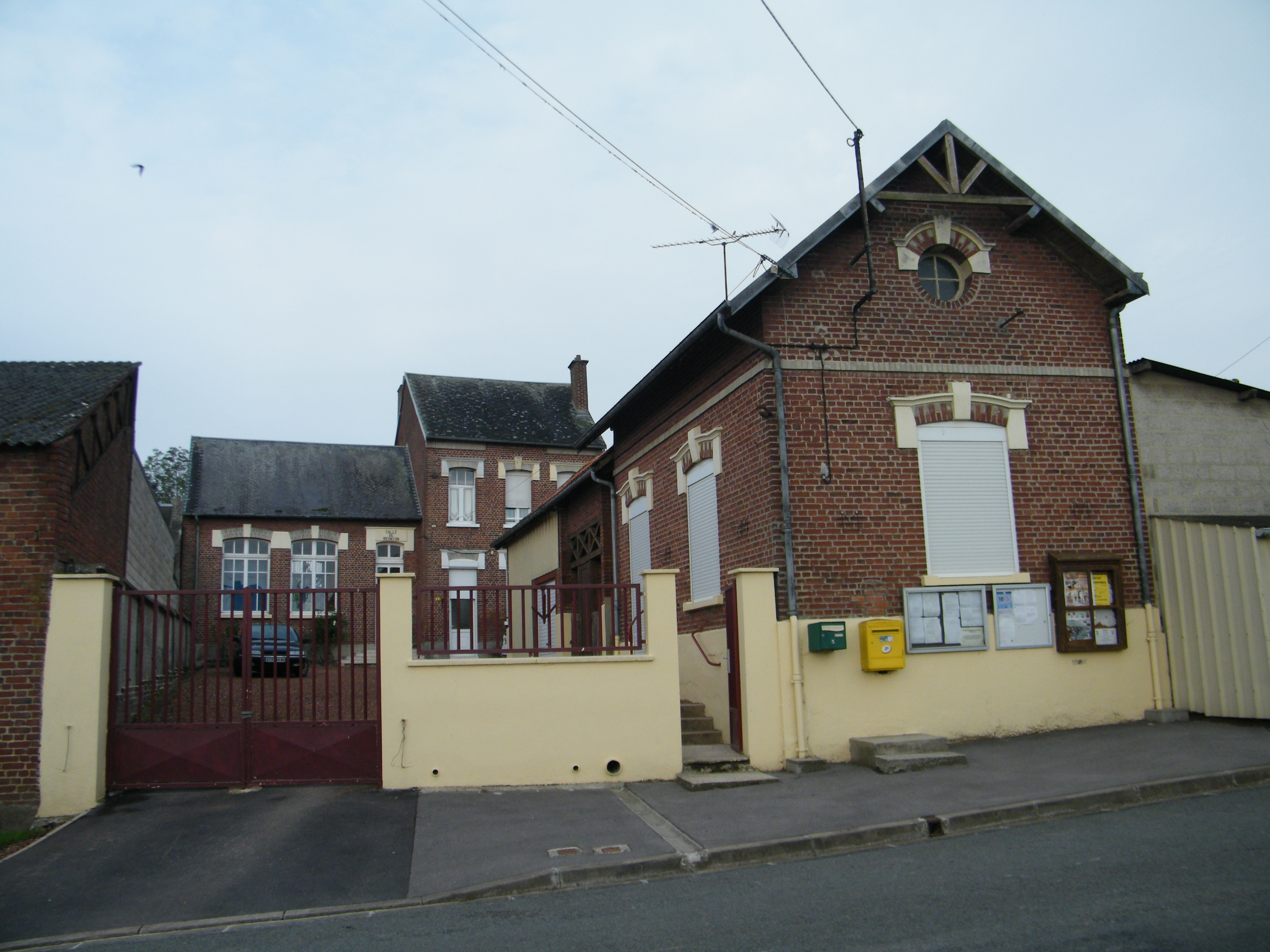 Mairie.